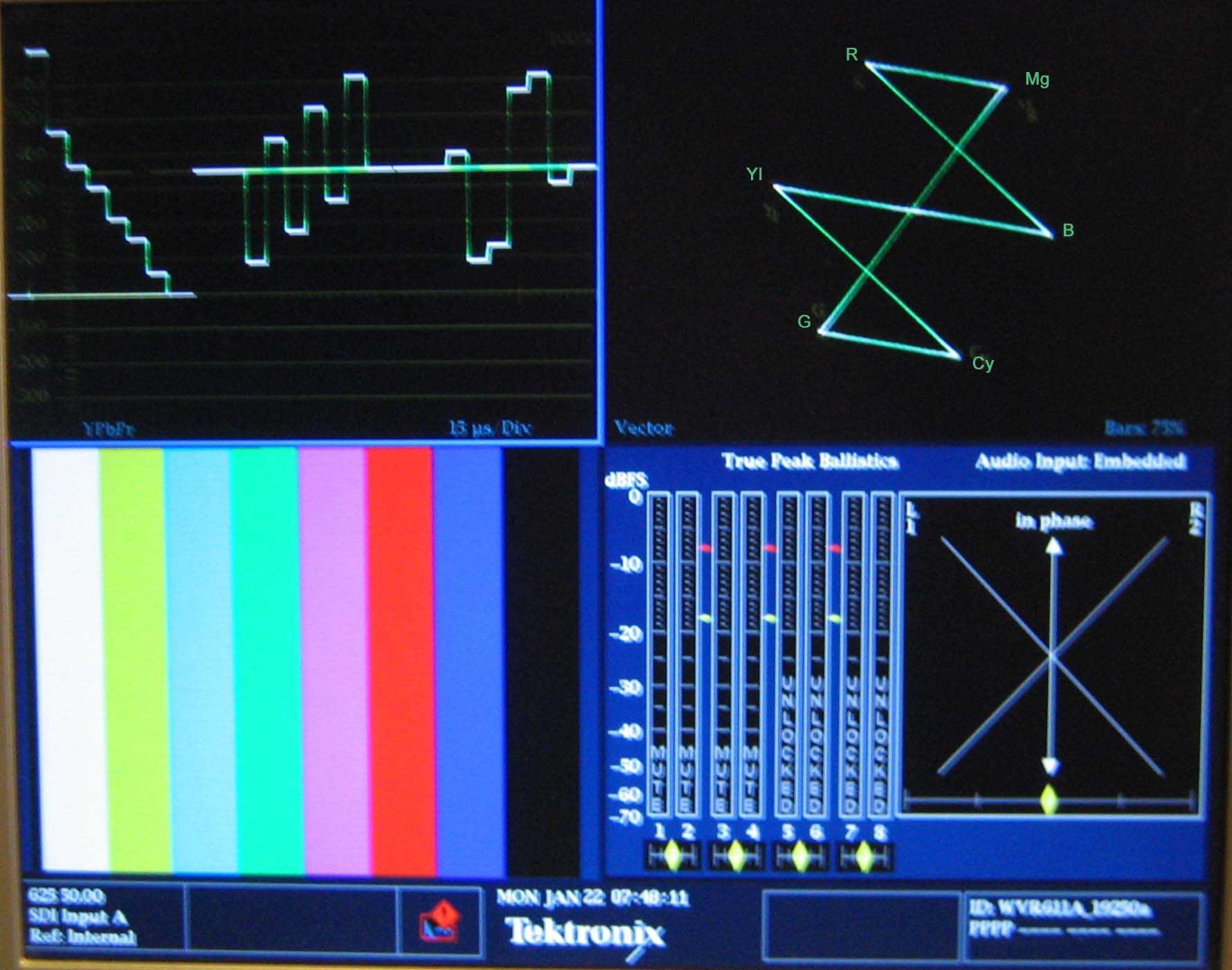 Barras de color EBU en formato YUV. Barra de color EBU en YUV.